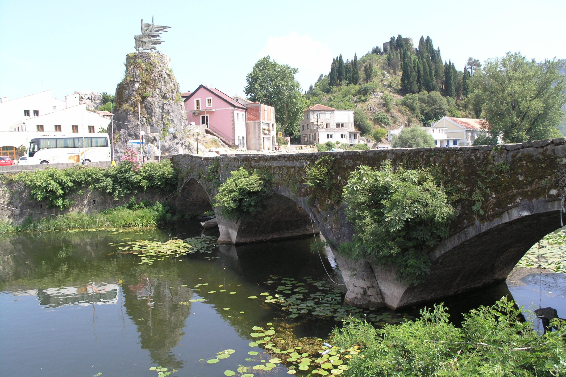 Černá Hora, Virpazar